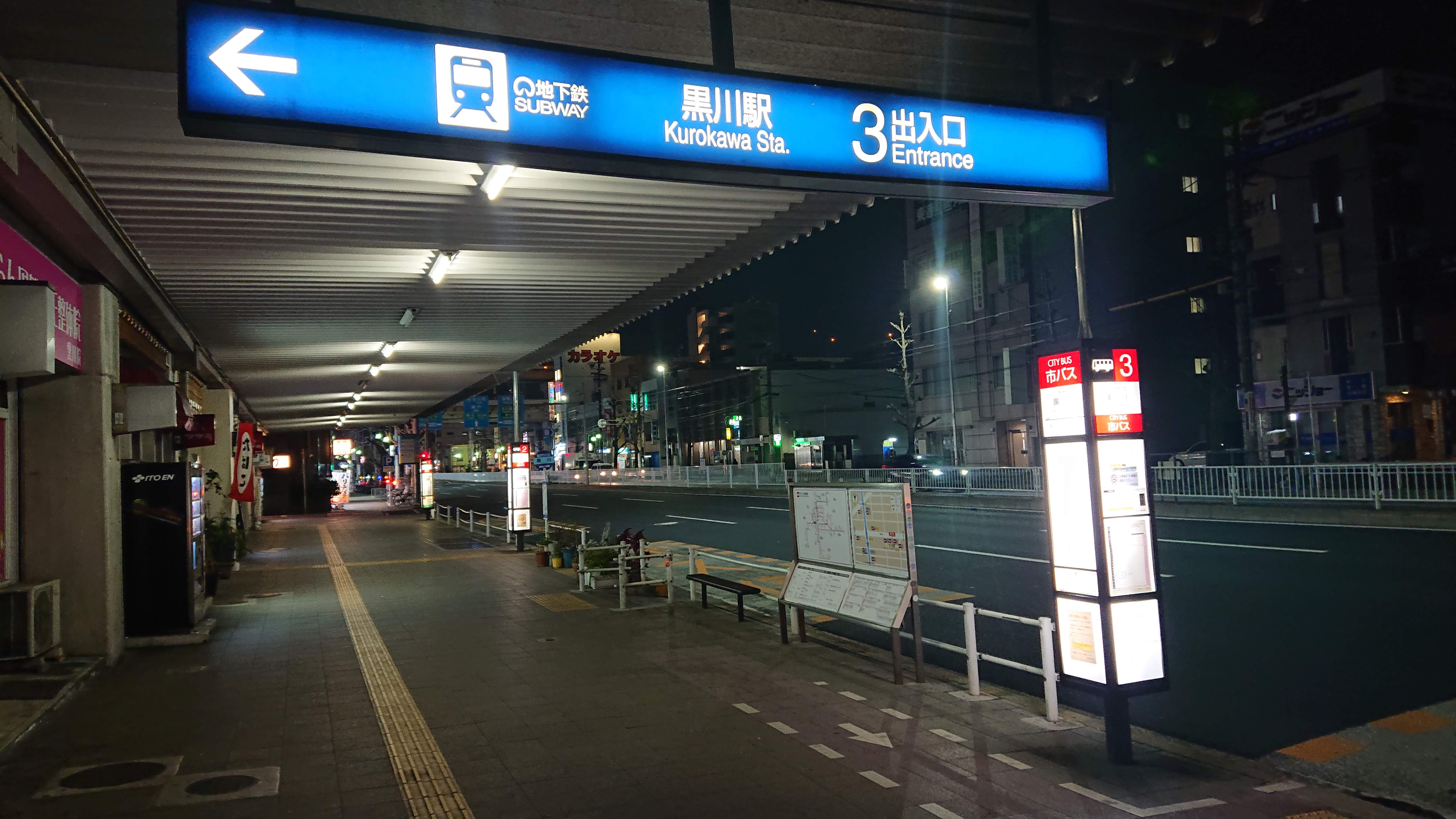 名古屋市営地下鉄名城線黒川駅